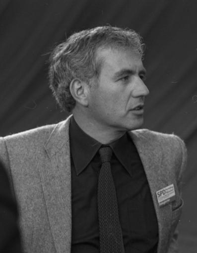 SPD-Parteitag in der Olympiahalle in München 19.-23.04.82